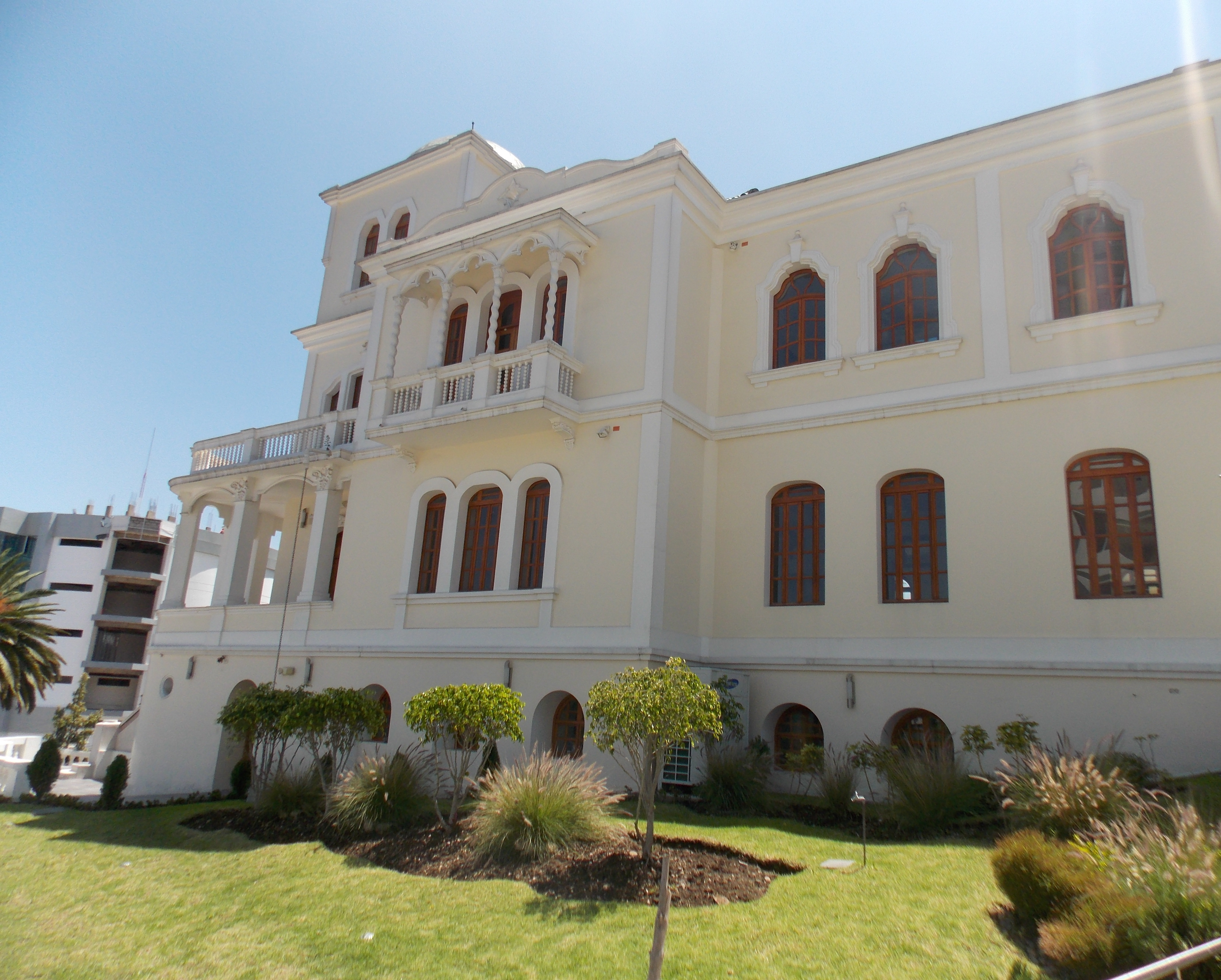 Fachada Occidental de la Villa Lasso, casa de protocolo de la Asamblea Nacional de Ecuador (enero 2016).